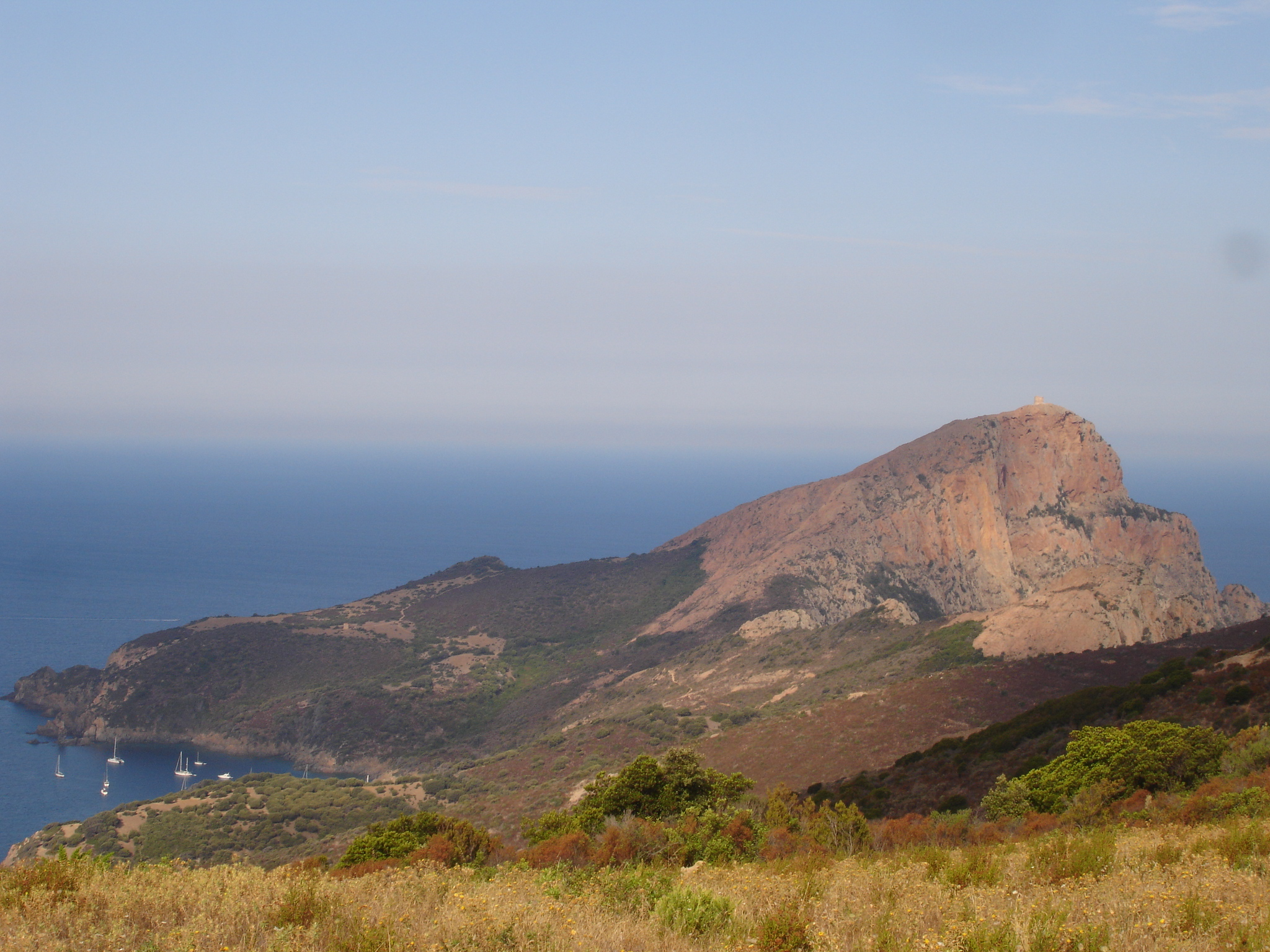 France, Corse-du-Sud (2A), Piana, Capo Rosso